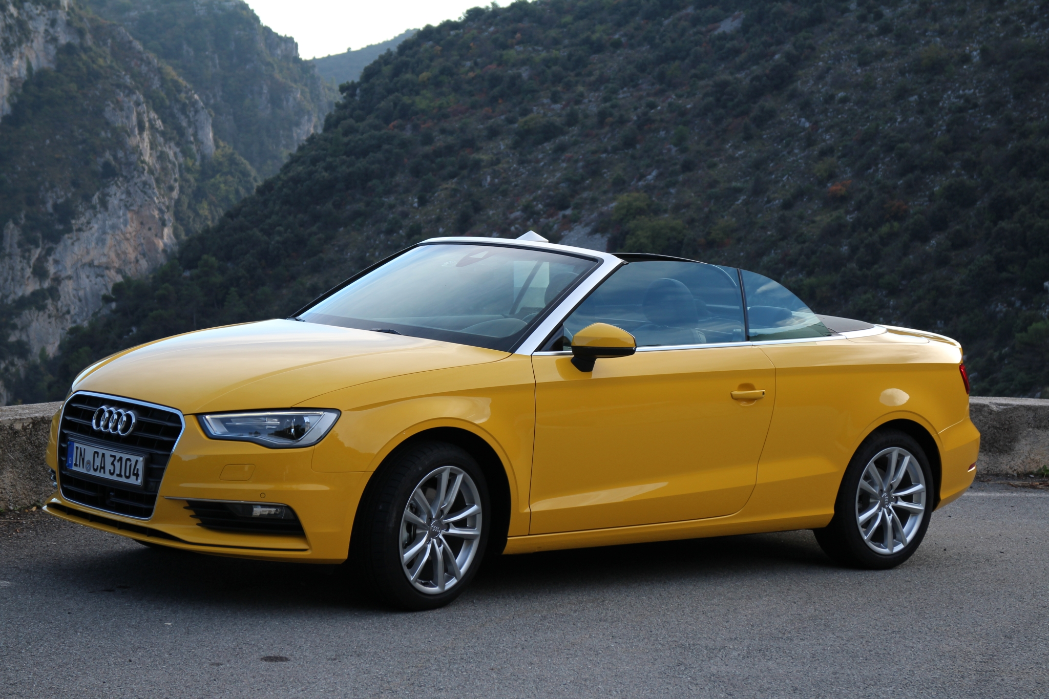 Audi A3 Cabrio 2013